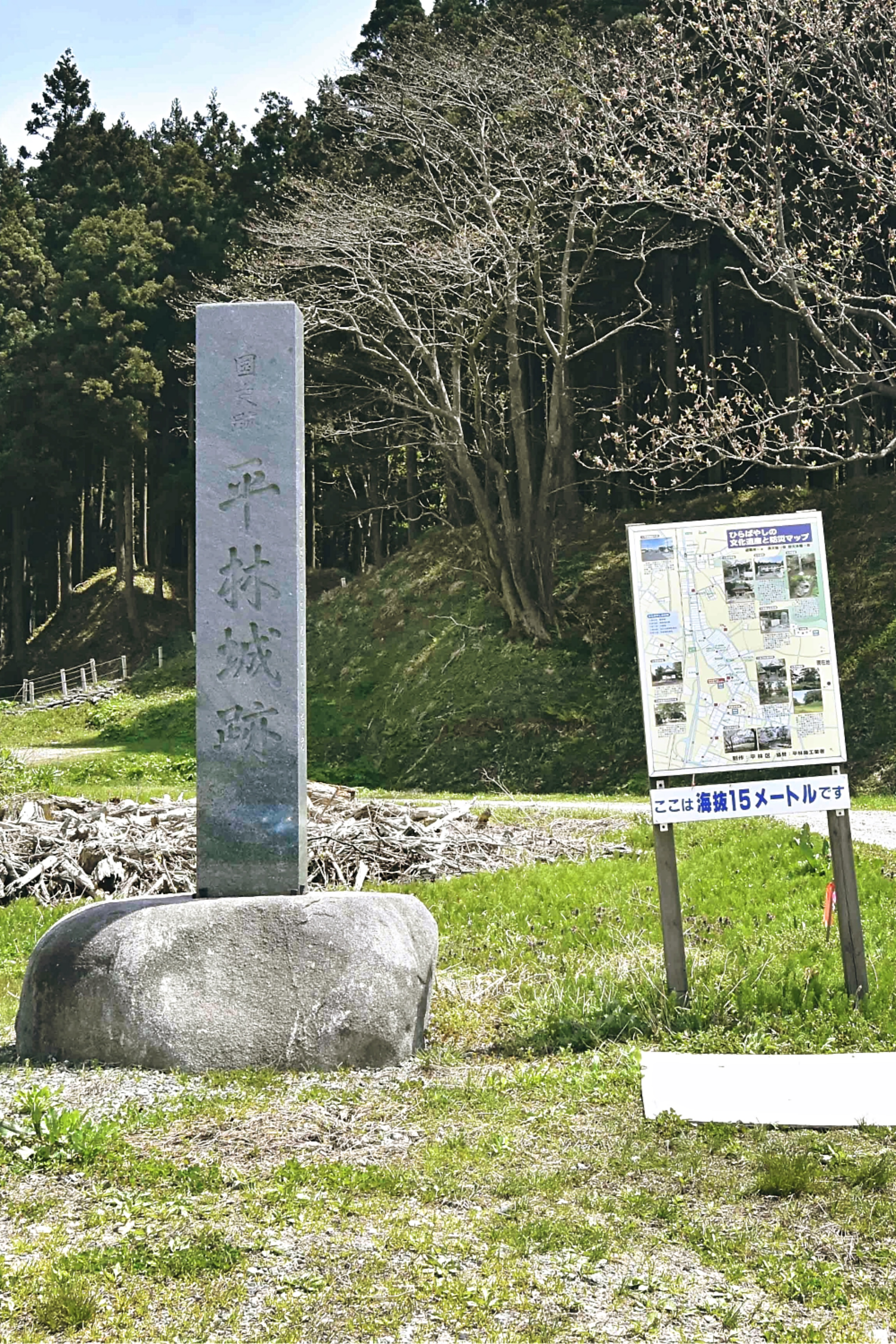 Site of Hirabayashi Castle, Murakami, Niigata, Japan